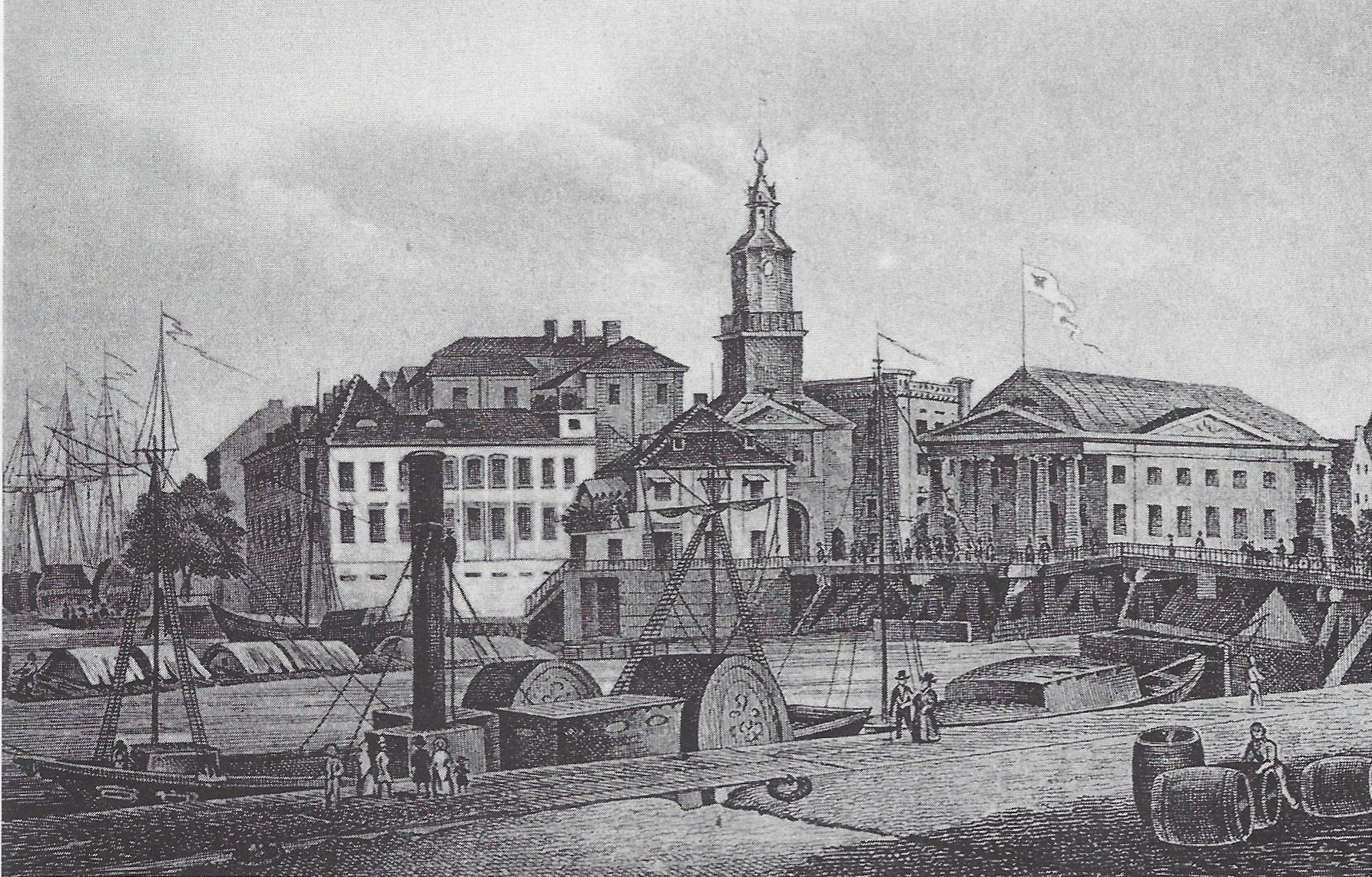 Südwestecke der Kneiphofinsel in Königsberg i. Pr.; im Vordergrund der alte Pregel, in der Mitte das Grüne Tor, rechts die alte (erste) Börse.